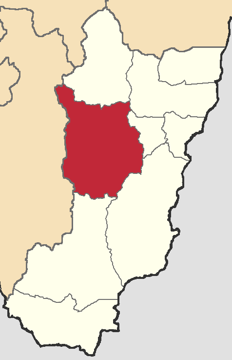 Mapa localizador del cantón en Zamora Chinchipe, Ecuador